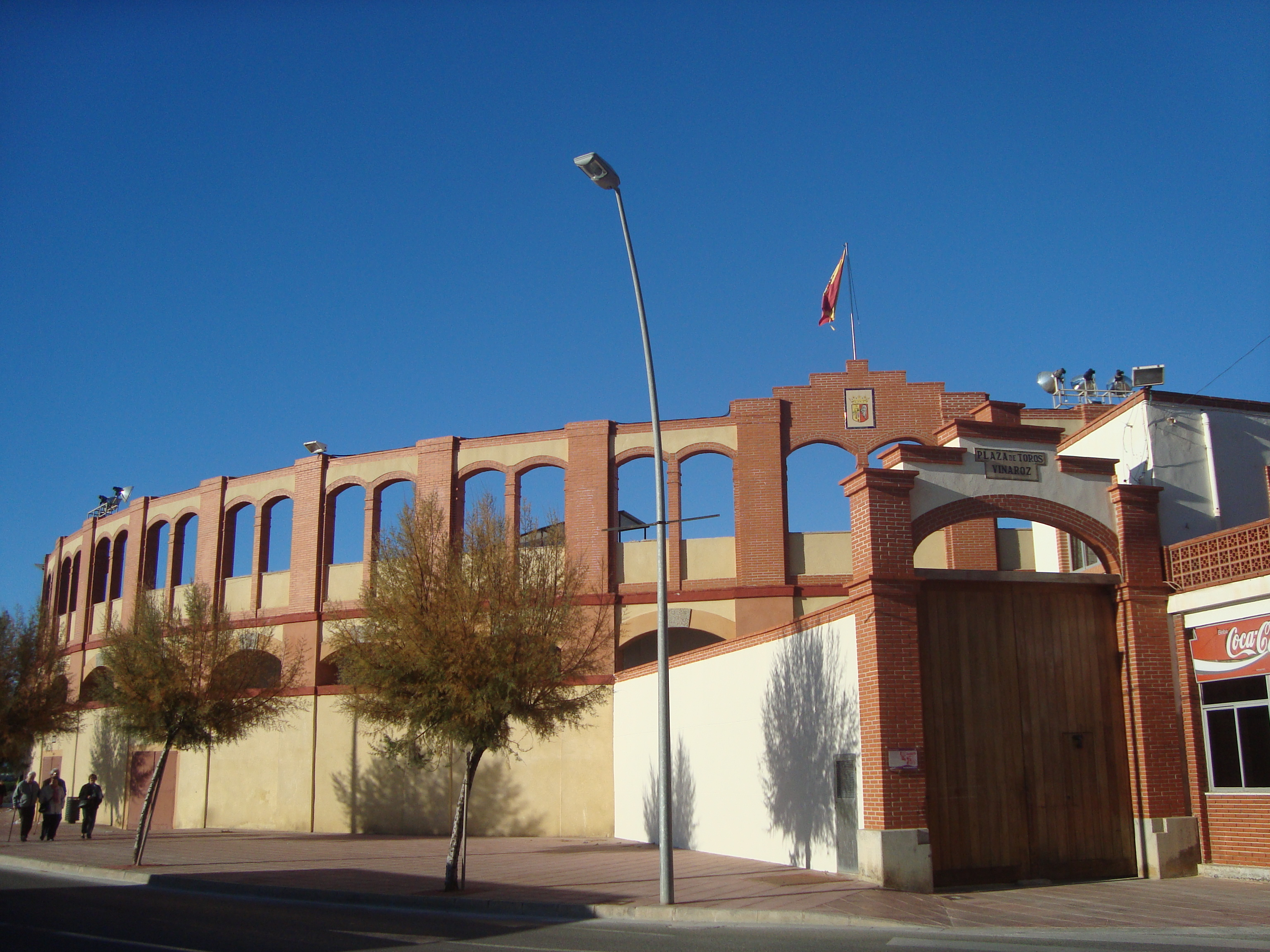 Plaça de Bous (Vinaròs). 03.138-017.